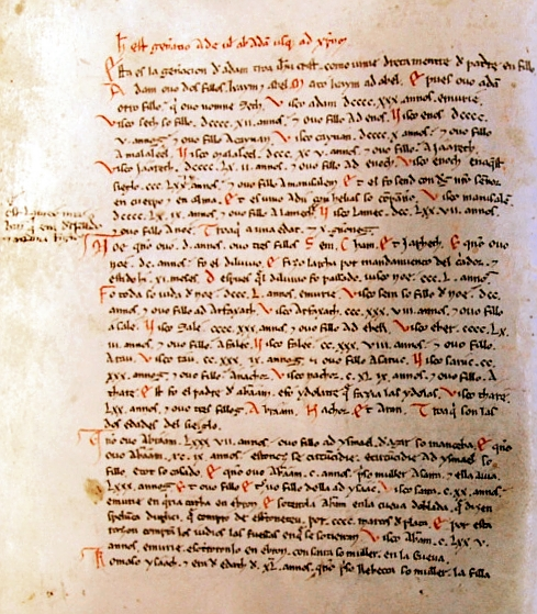 Liber regum en el codex villarensis.